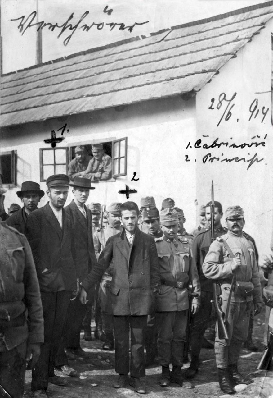 Princip ve Cabrinovic hapishanede muhafızlarla birlikte, 1914. Not: Kafasının üstünde 1 olan Cabrinovic, 2 olan Princip'dir.